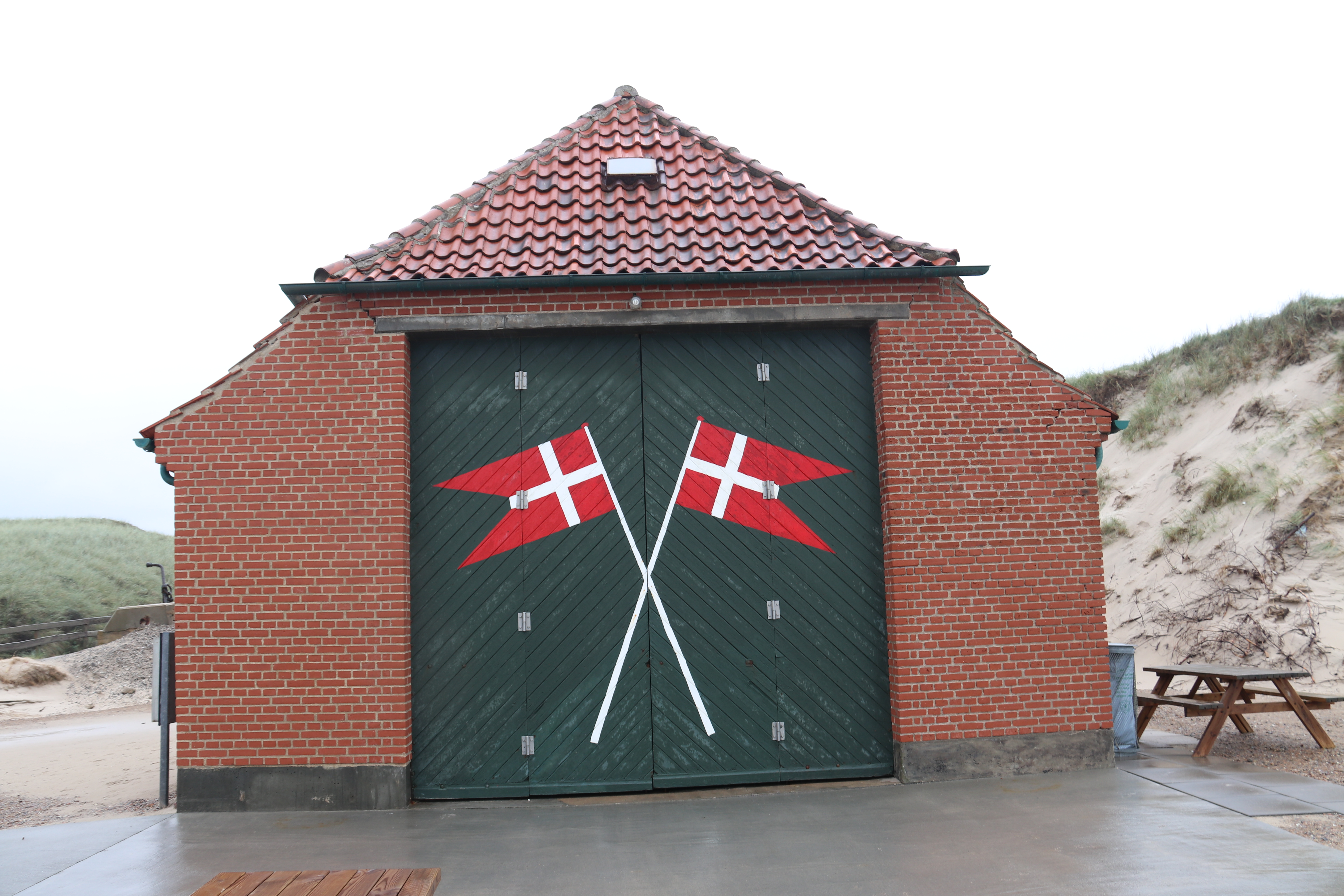 Løkken Bootshaus